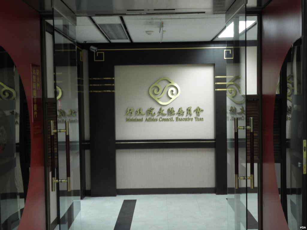 台灣陸委會。